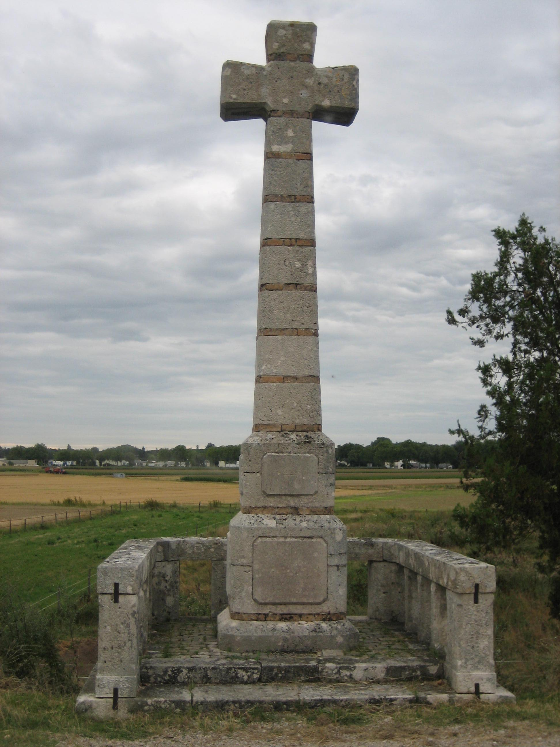 Croix de Micy, ancienne abbaye Saint-Mesmin de Micy, Loiret, Centre, France